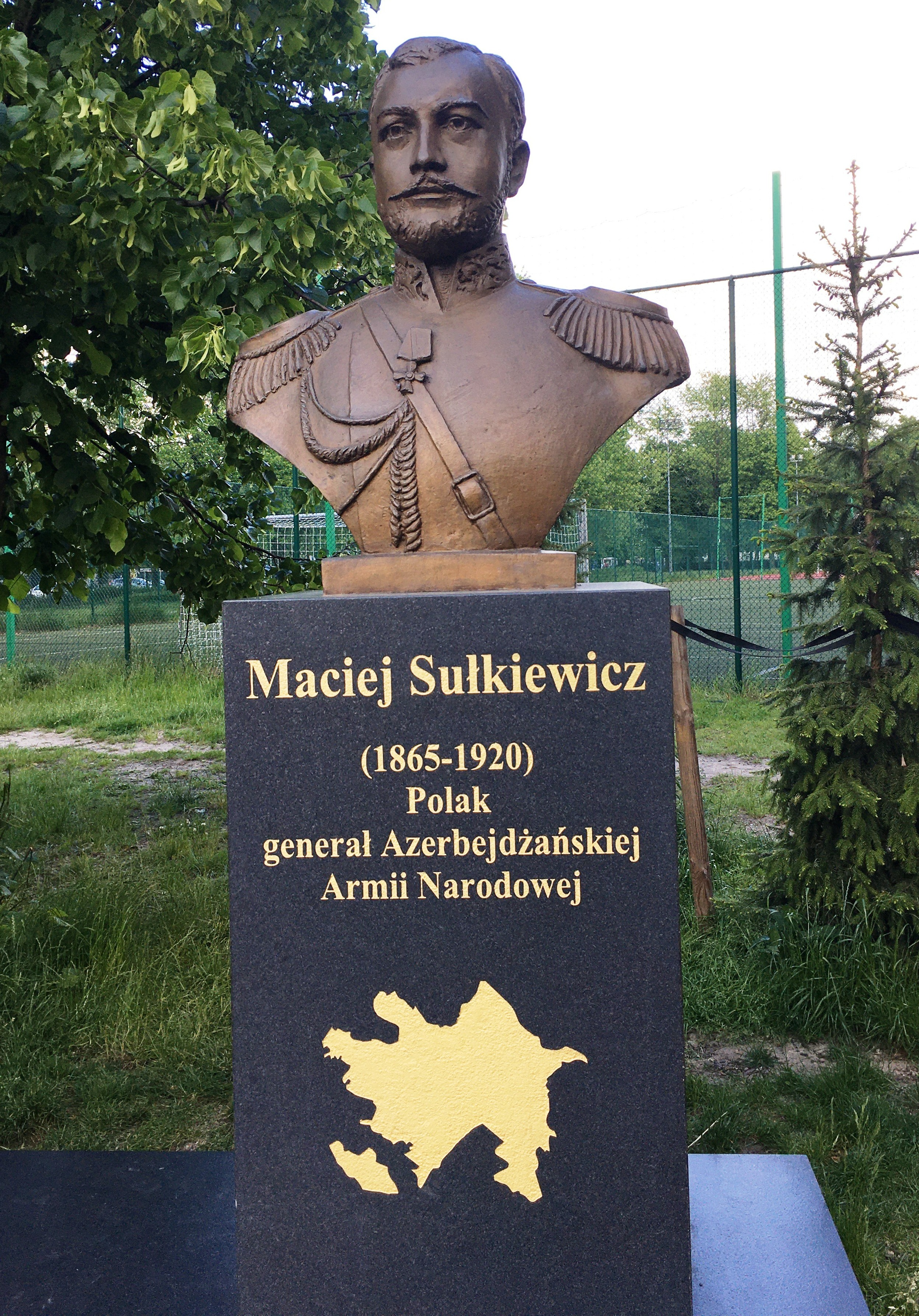 Vəli bəy Yadigarın Varşava şəhərinin Praqa rayonunda ucaldılmış abidəsi